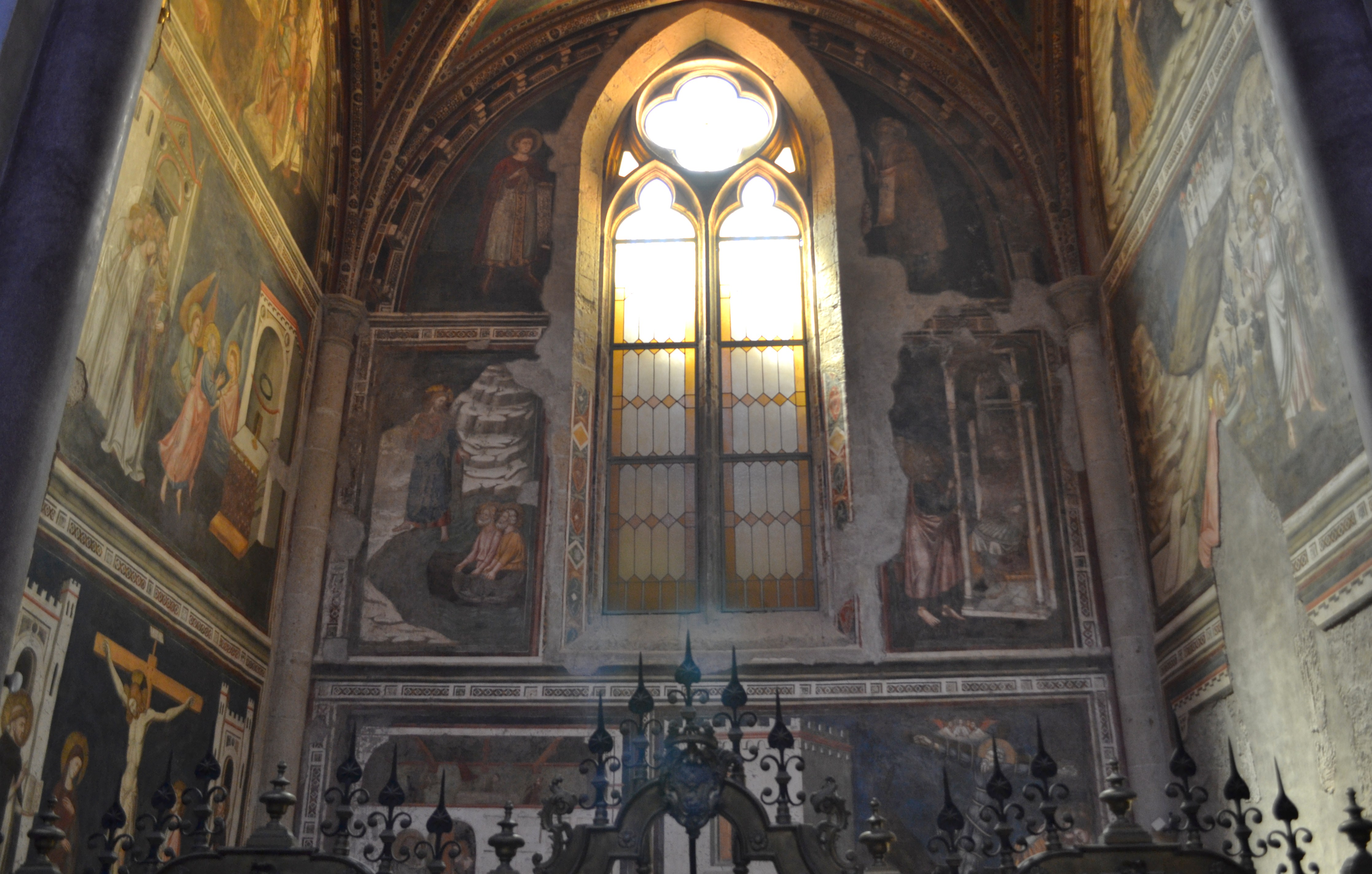 Chiesa di San Domenico Maggiore (Napoli) - Cappella degli affreschi (ciclo di Pietro Cavallini)